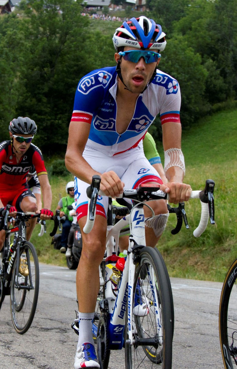 182 pinot en sanchez